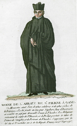 Collection de costumes de tous les ordres monastiques, supprimés à differentes époques, dans la ci-devant Belgique, Bruxelles, Philippe Joseph Maillart et sœur, 1811